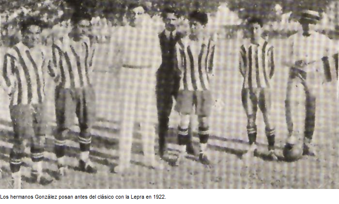 The González Brothers pictured before the Mendocino derby.